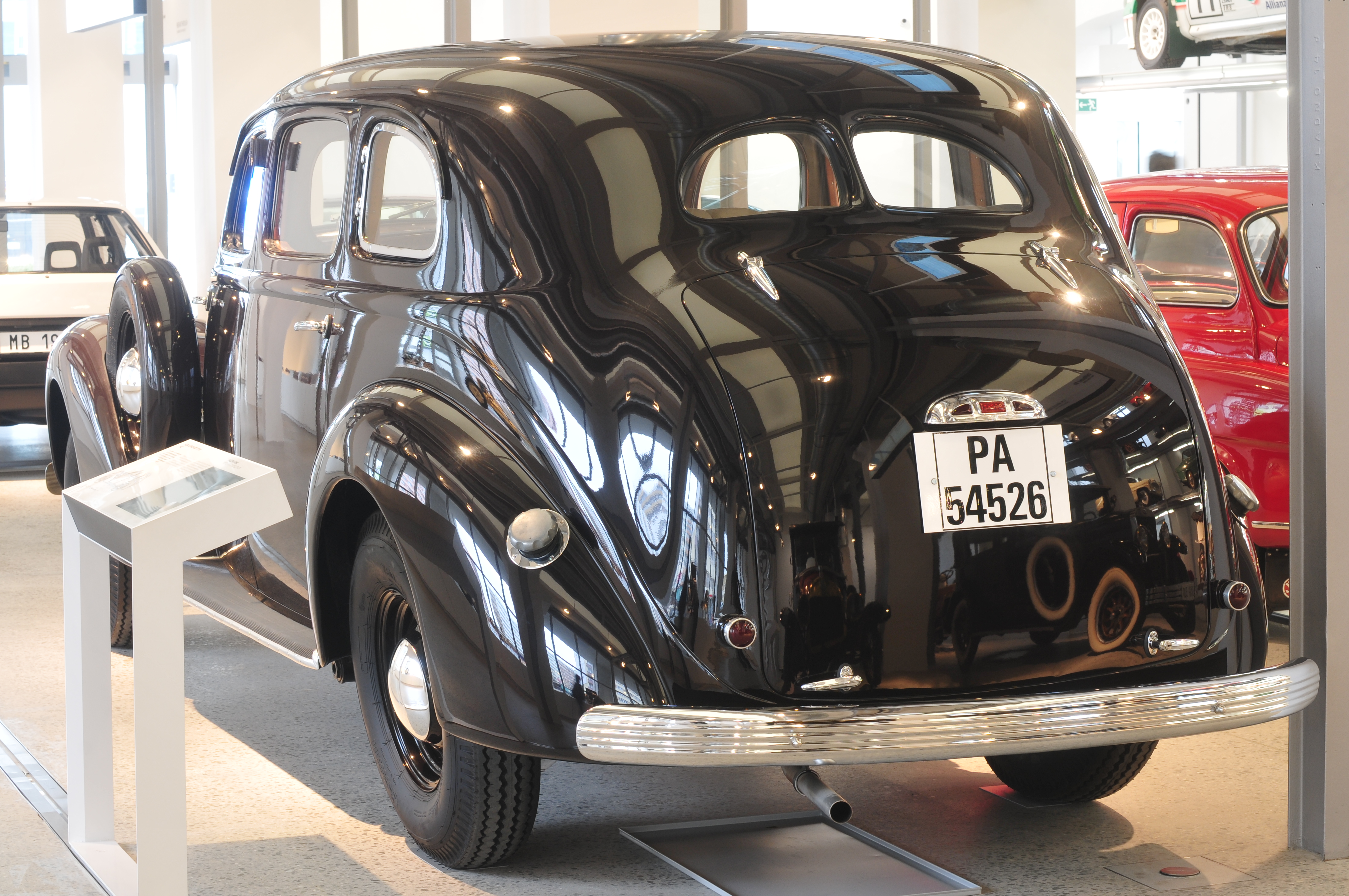 Fototermin Škoda Museum Mladá Boleslav 2013 Fototermin Škoda Muzeum 5. April 2013 in Mladá Boleslav This work is free and may be used by anyone for any purpose. If you wish to use this content, you do not need to request permission as long as you follow any licensing requirements mentioned on this page.